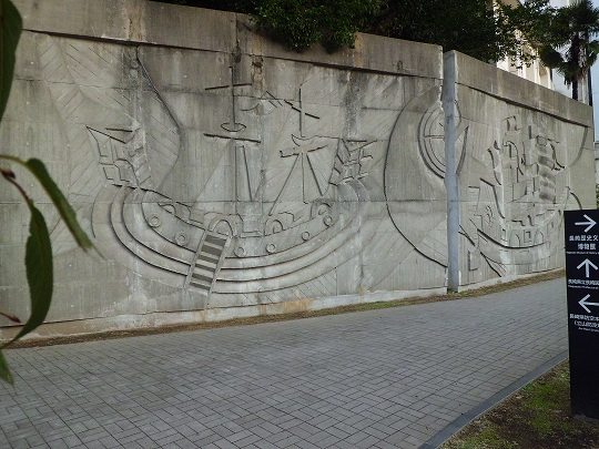 旧長崎県立美術博物館の壁の一部（長崎県立長崎図書館の裏手、立山防空壕そばに設置されている。